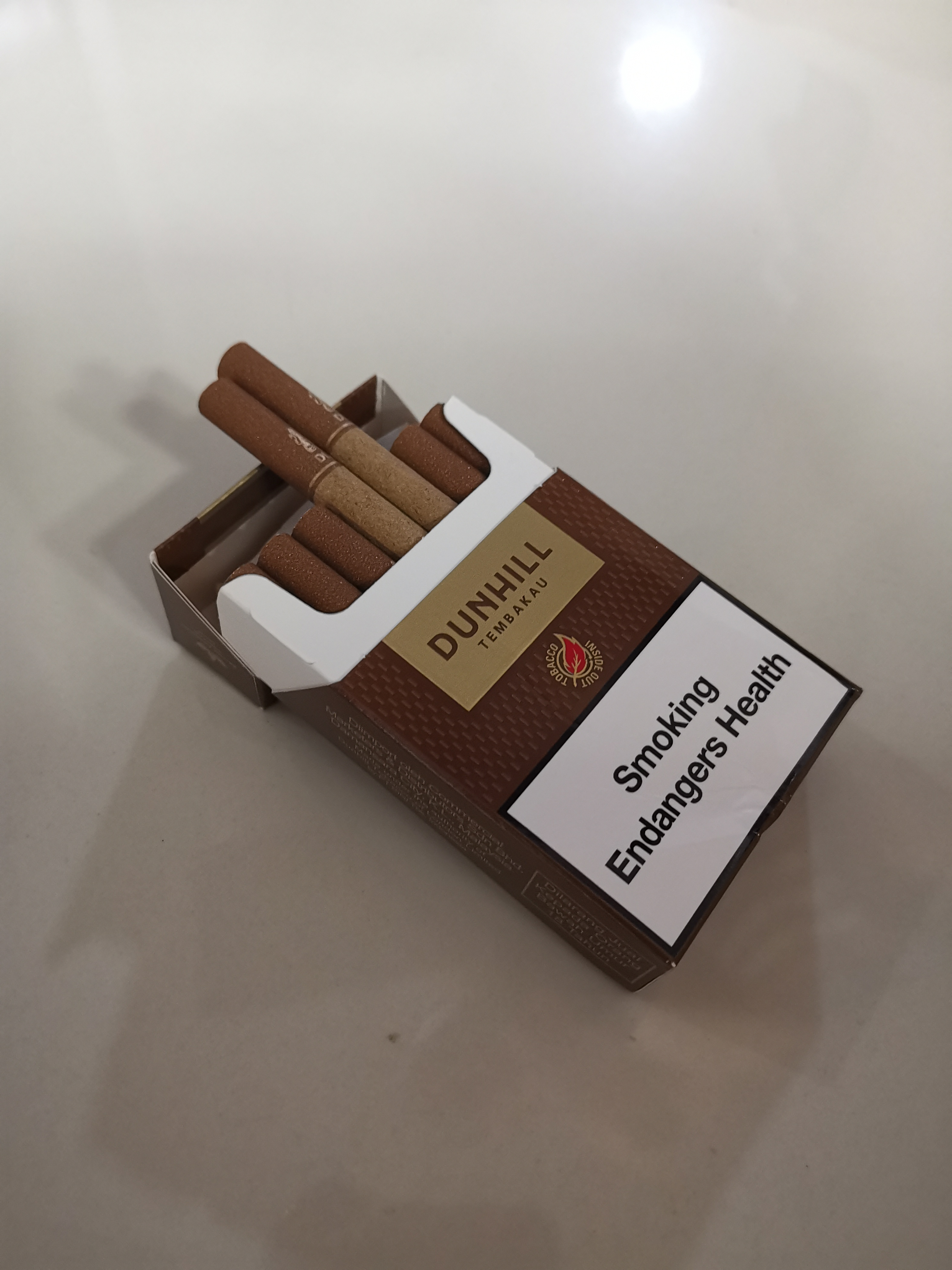 Gambar pek Dunhill Tembakau di Malaysia